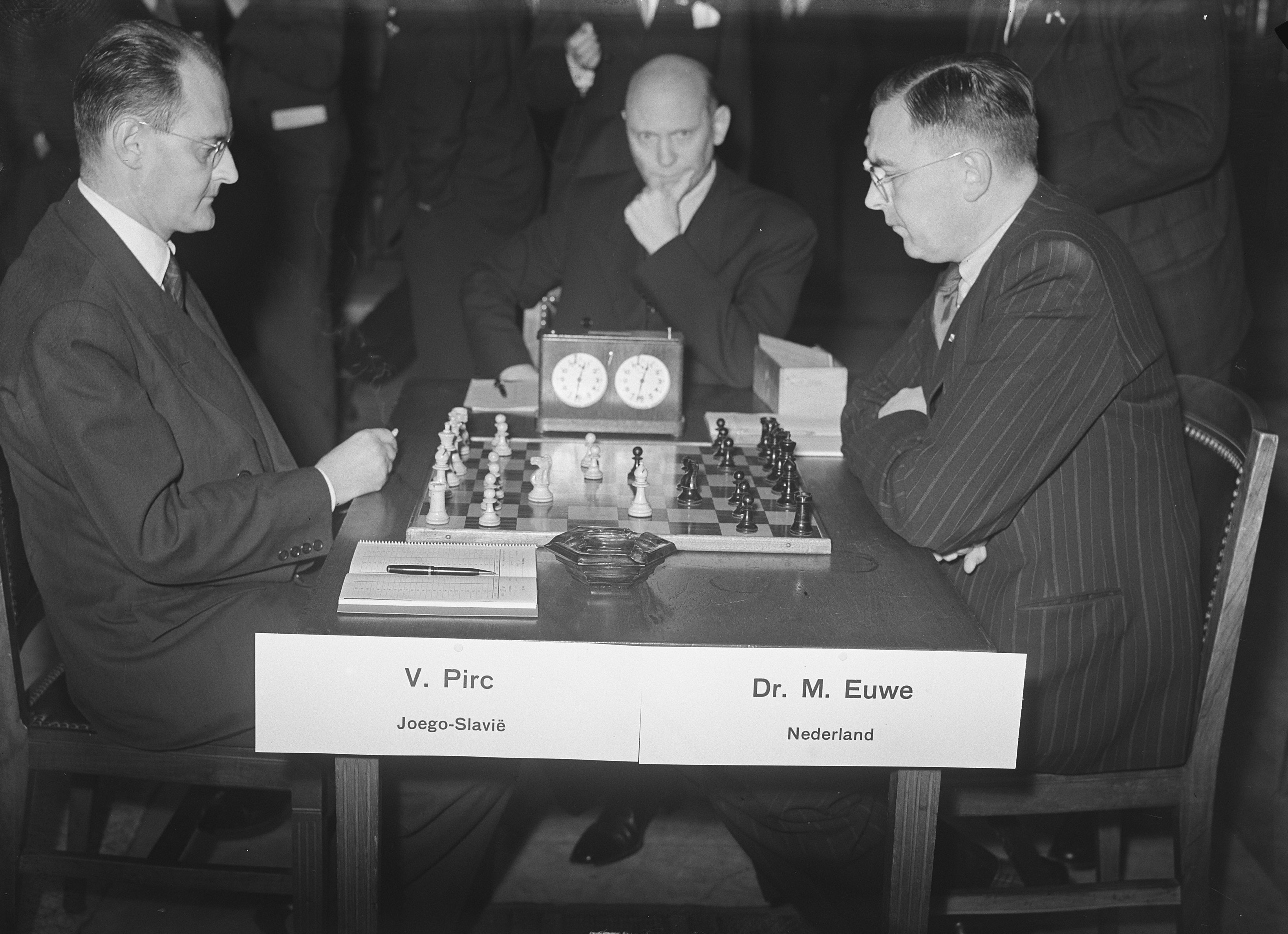 Collectie / Archief : Fotocollectie Anefo Reportage / Serie : [ onbekend ] Beschrijving : Wereldschaaktoernooi eerste dag; Max Euwe tegen V. Pirc (links) Datum : 11 november 1950 Locatie : Amsterdam, Noord-Holland Trefwoorden : schaken, sport Persoonsnaam : Euwe Max, Pirc V Fotograaf : Pot, Harry / Anefo Auteursrechthebbende : Nationaal Archief Materiaalsoort : Glasnegatief Nummer archiefinventaris : bekijk toegang 2.24.01.09 Bestanddeelnummer : 904-2913